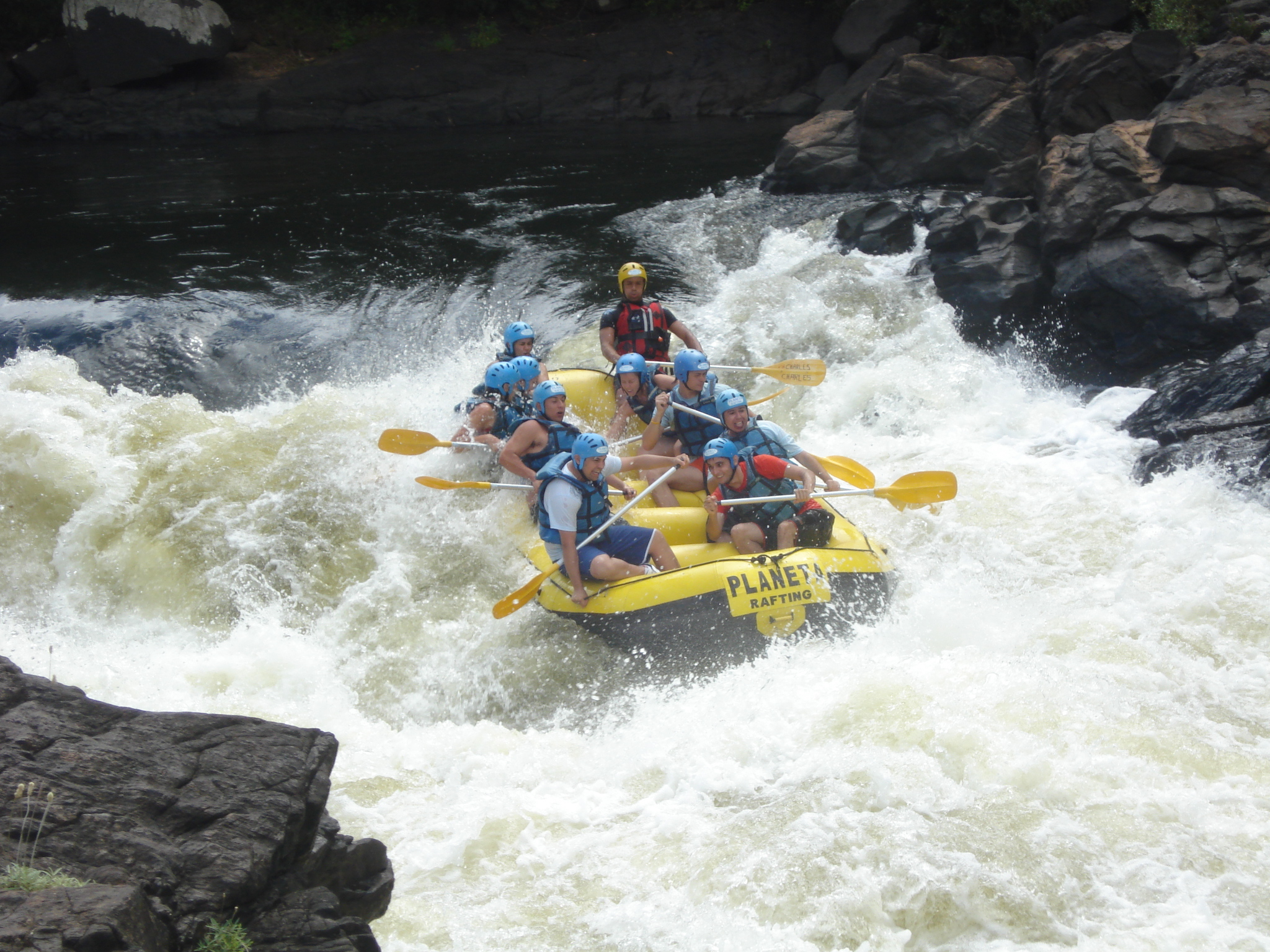 Rafting no Rio de Contas em Taboquinhas, Itacaré, BA (Brasil)